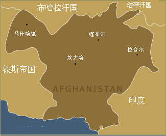 杜兰尼阿富汗